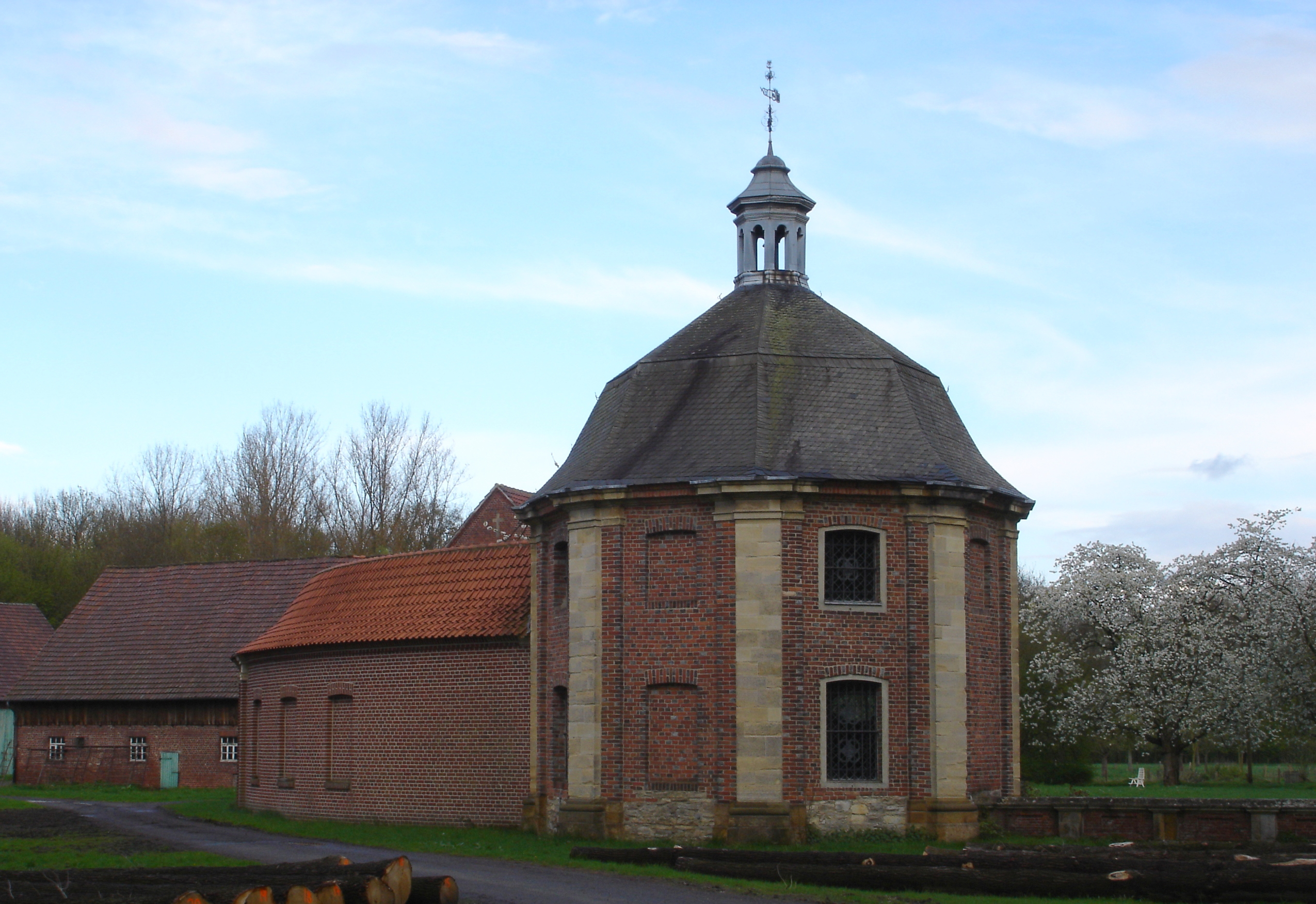 Chapel of "Haus Luetkenbeck" in Münster, Westphalia, Germany